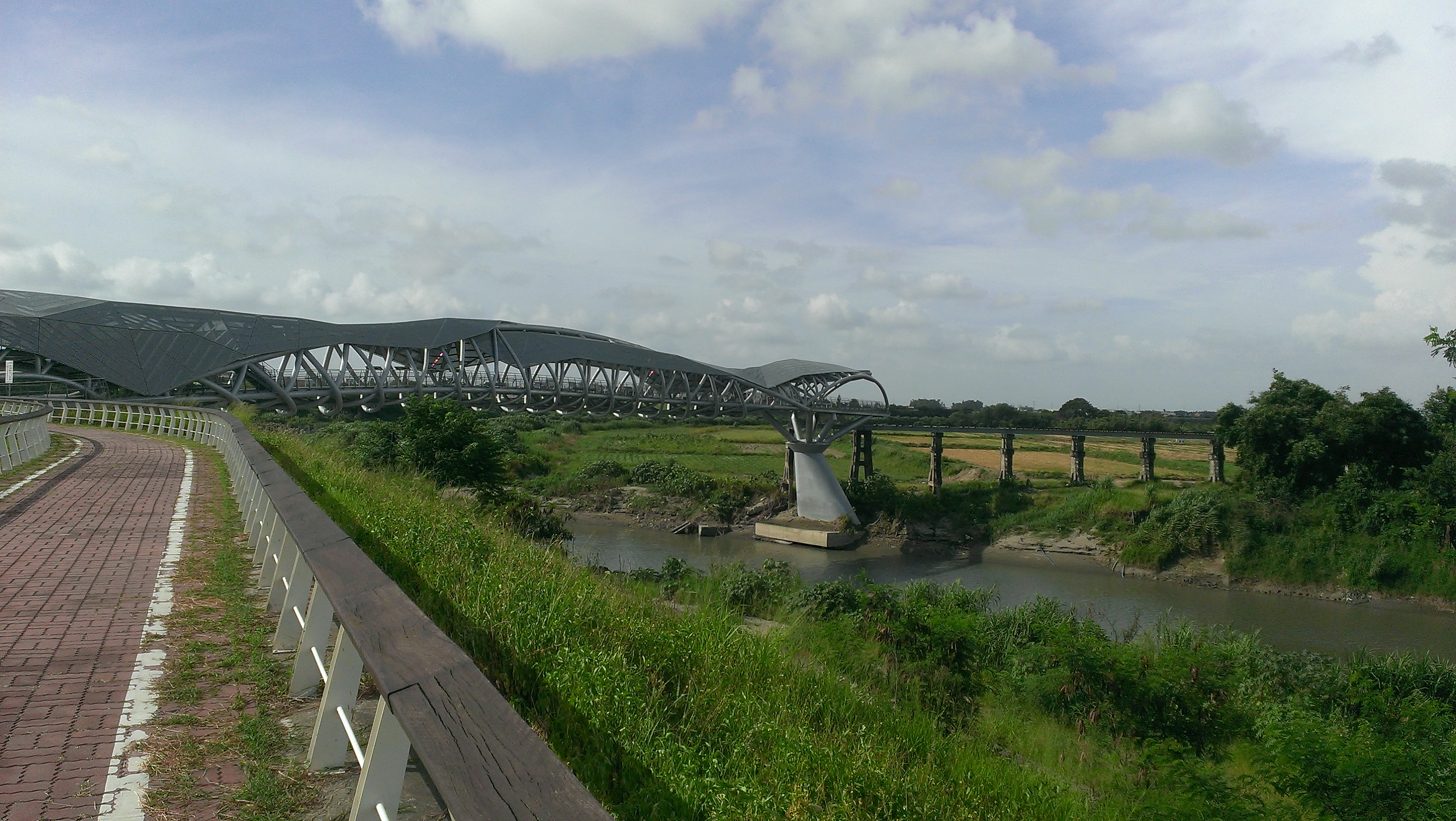 北港復興鐵橋與北岸新建的跨北港溪人行陸橋